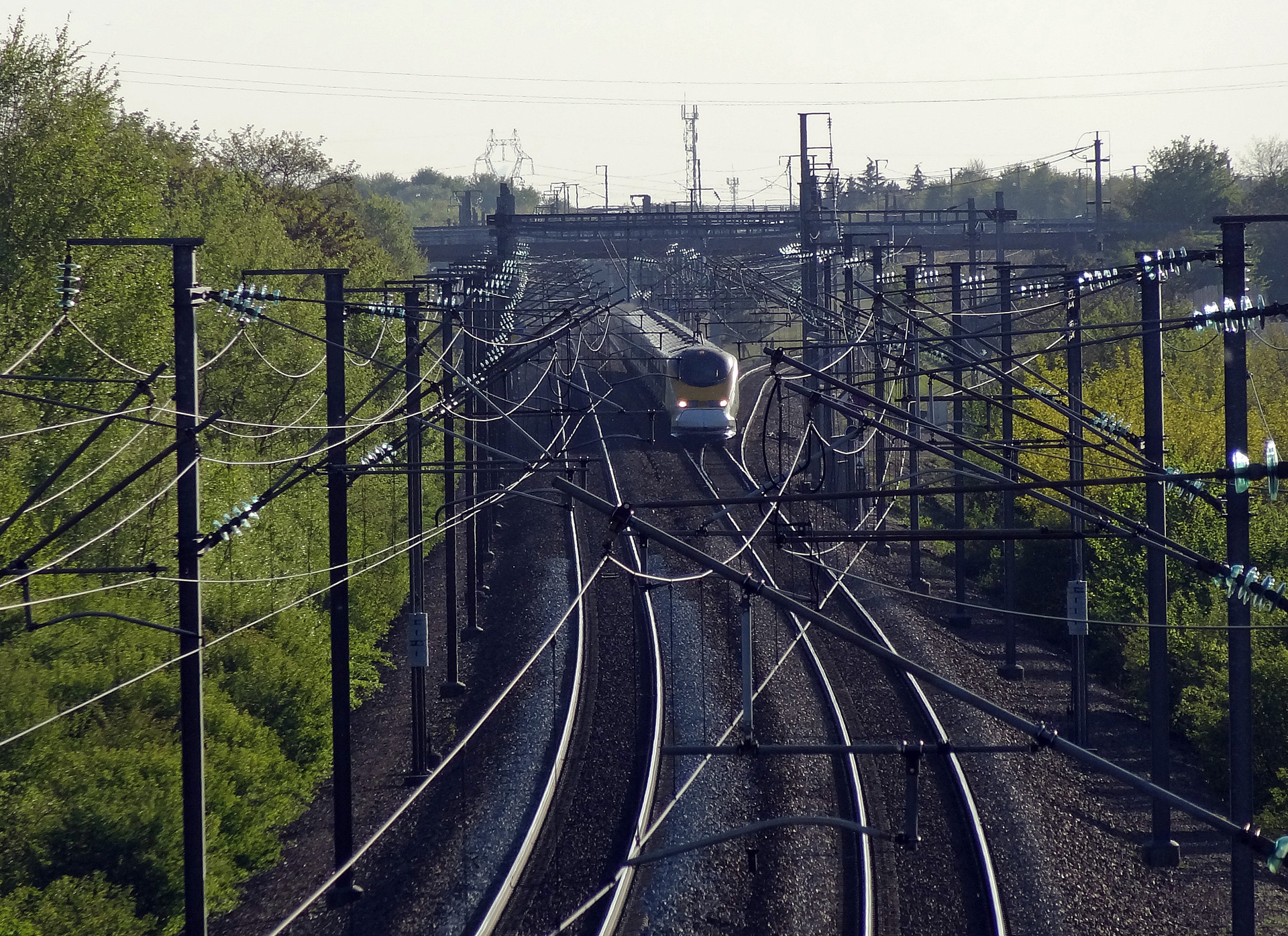 Une rame TMST en provenance de Paris-Nord sur la LGV Nord, à hauteur du triangle de Vémars, à Moussy-le-Neuf (Seine-et-Marne), France.